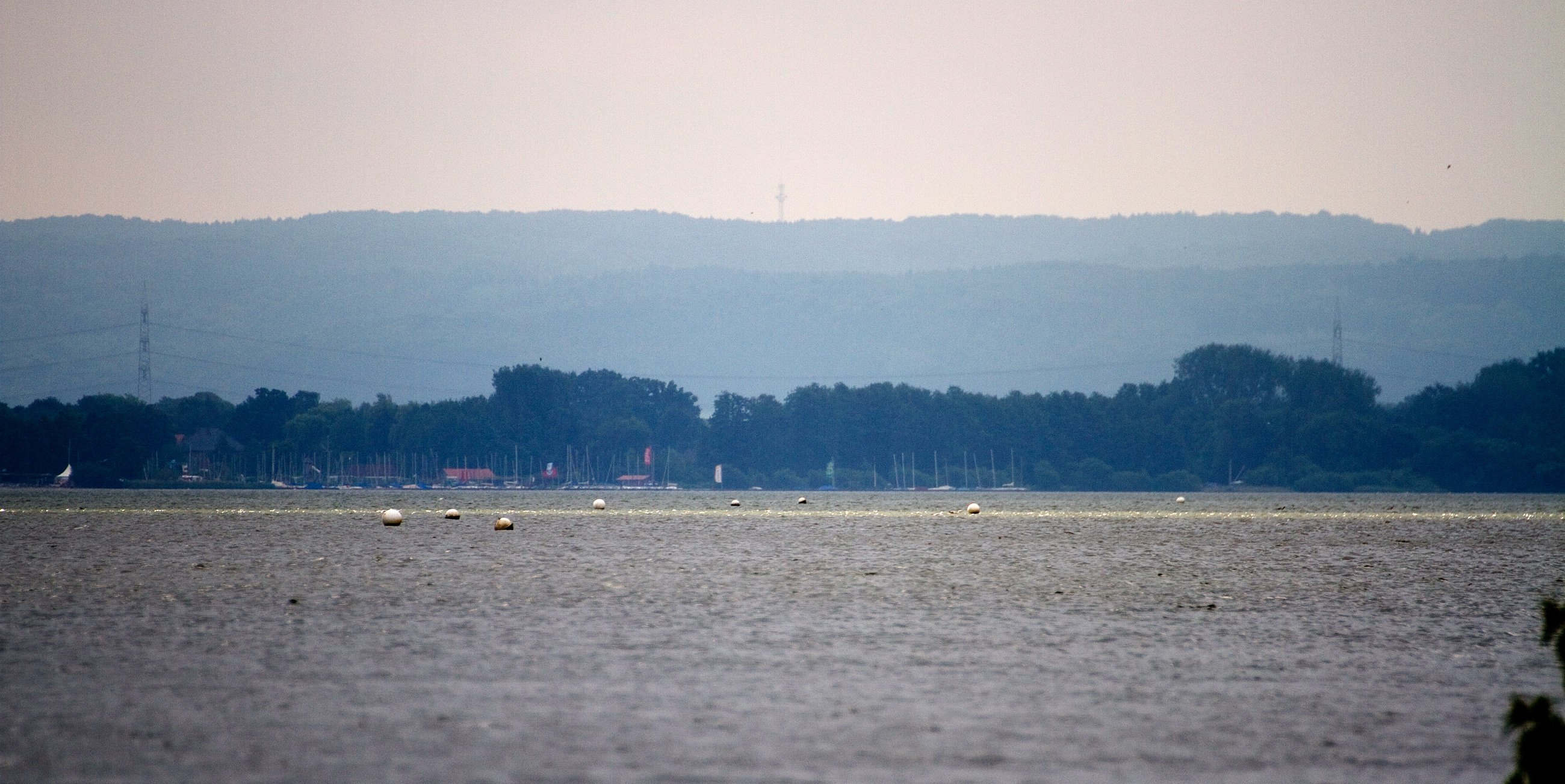 Blick von Eickhöpen aus in Richtung Dümmerlohausen. Aus dem Wasser markieren weiße Bojen die Naturschutzbereiche.